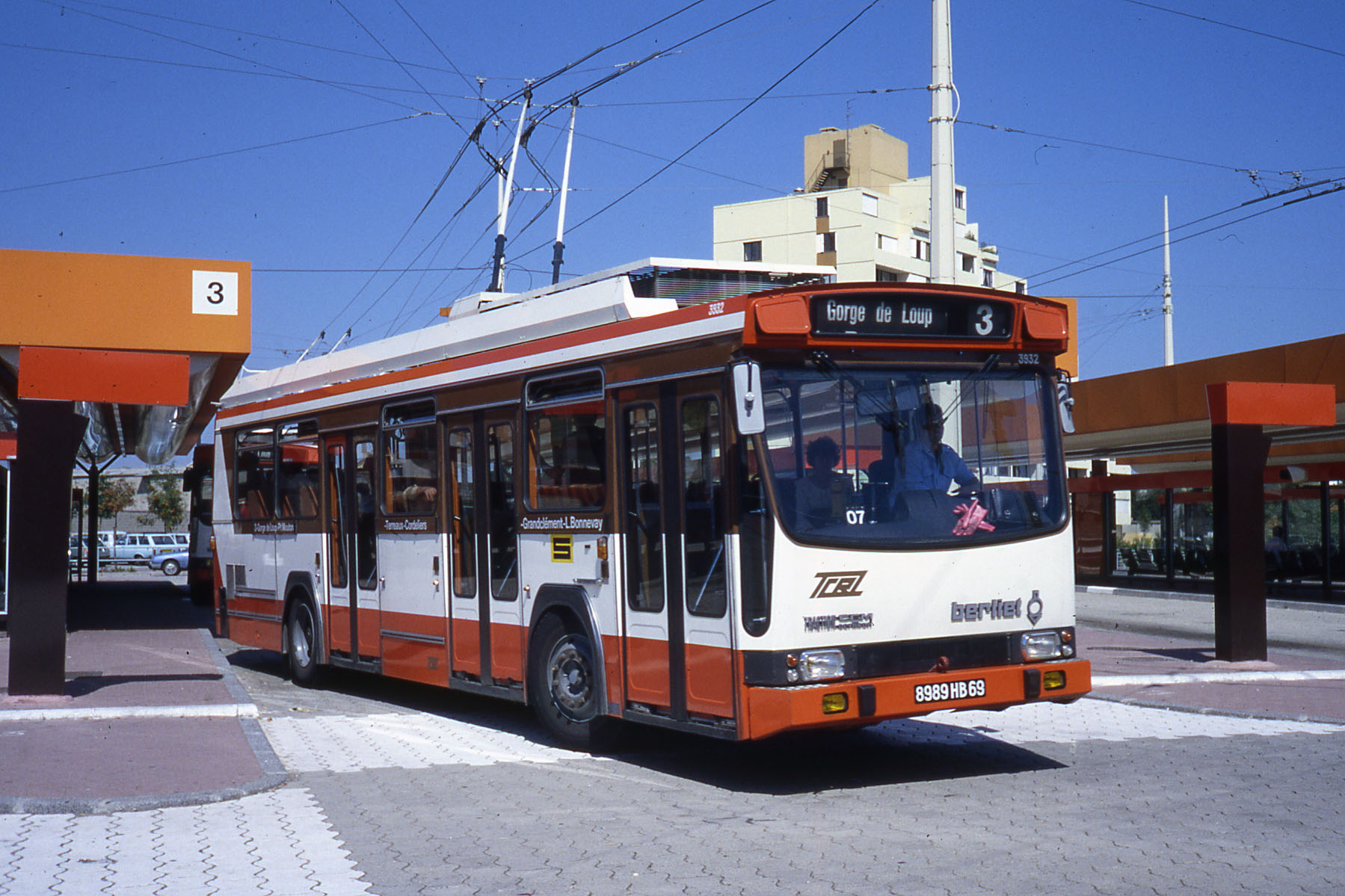 Un Berliet ER100 à Lyon en 1980